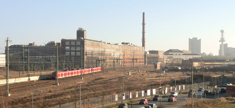 Continental-Werk Hannover, Rückseite von der Bahnseite Foto aufgenommen von Benutzer Axel Hindemith, Januar 2006 other_versions Originally from de.wikipedia; description page is (was) here 02:26, 16. Jan 2006 AxelHH 924 x 426 (120.018 Bytes) ('Continental-Werk Hannover, Rückseite von der Bahnseite Foto aufgenommen von Benutzer Axel Hindemith, Januar 2006)